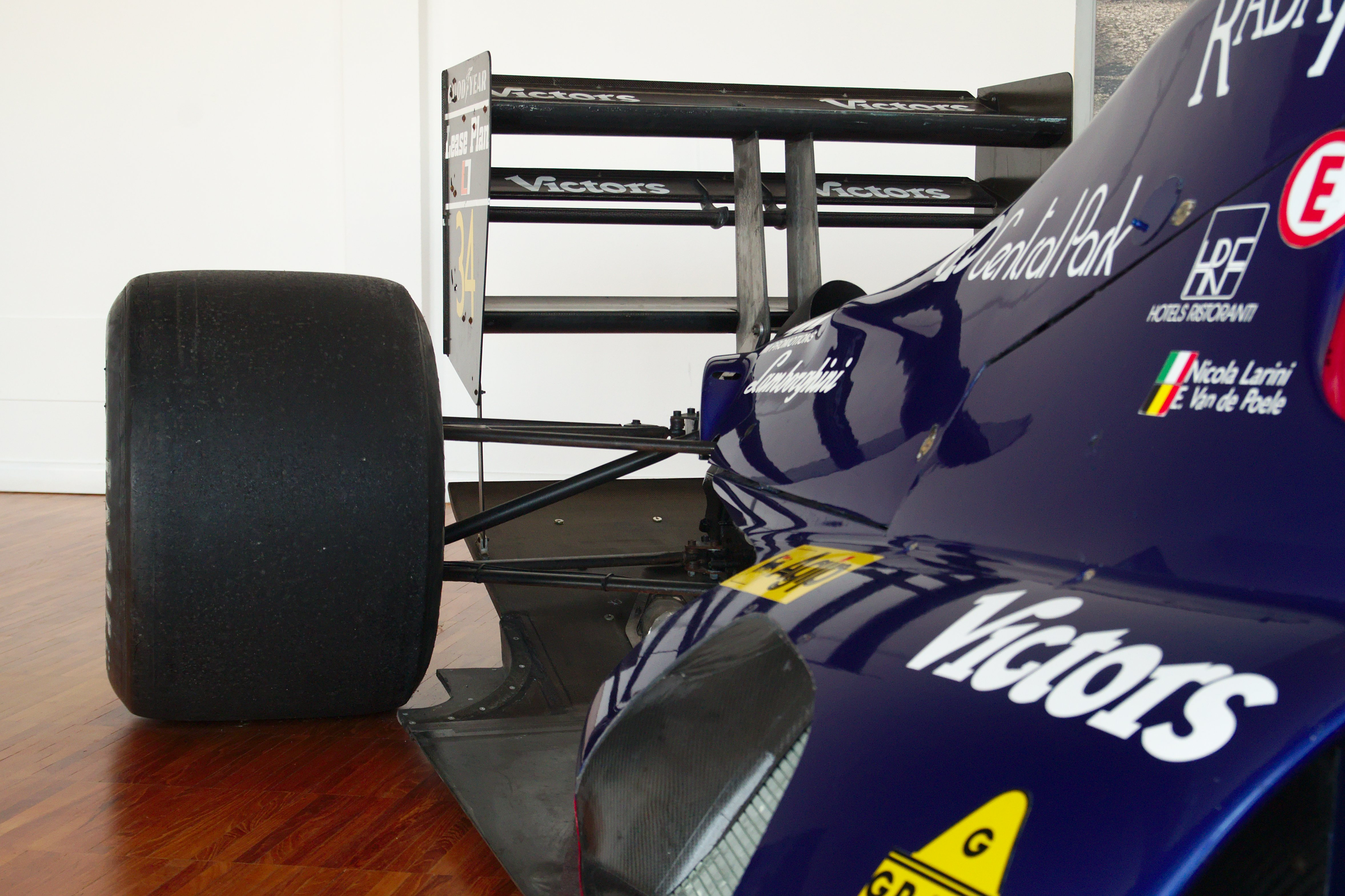 Lamborghini Modena 291 F1, 1991